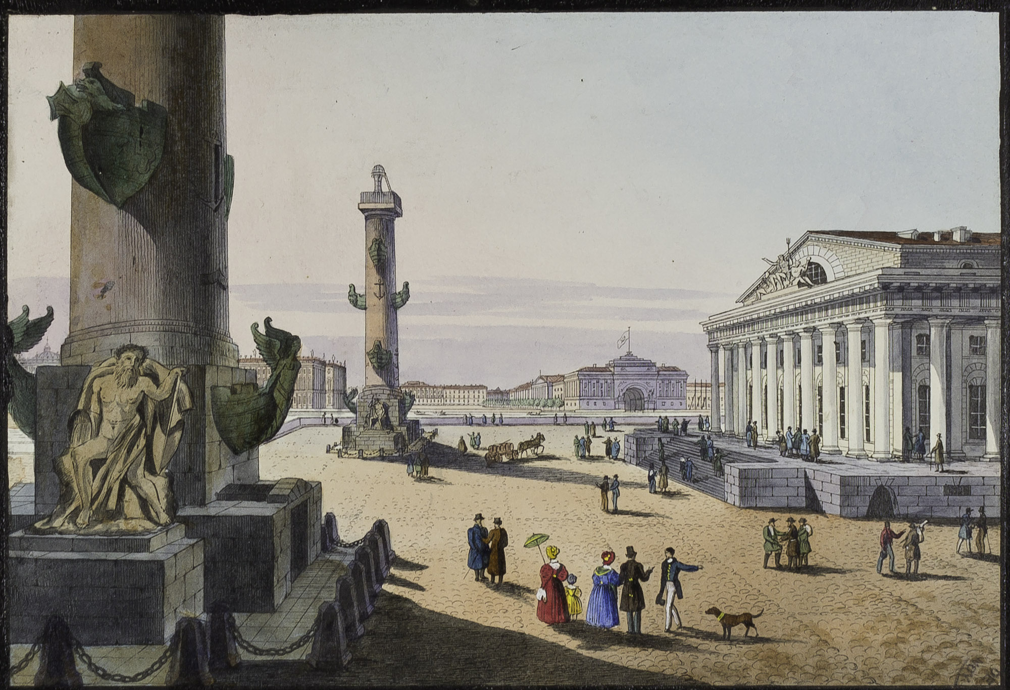 Enluminure de Ch. Beggrow, Saint Petersbourg.